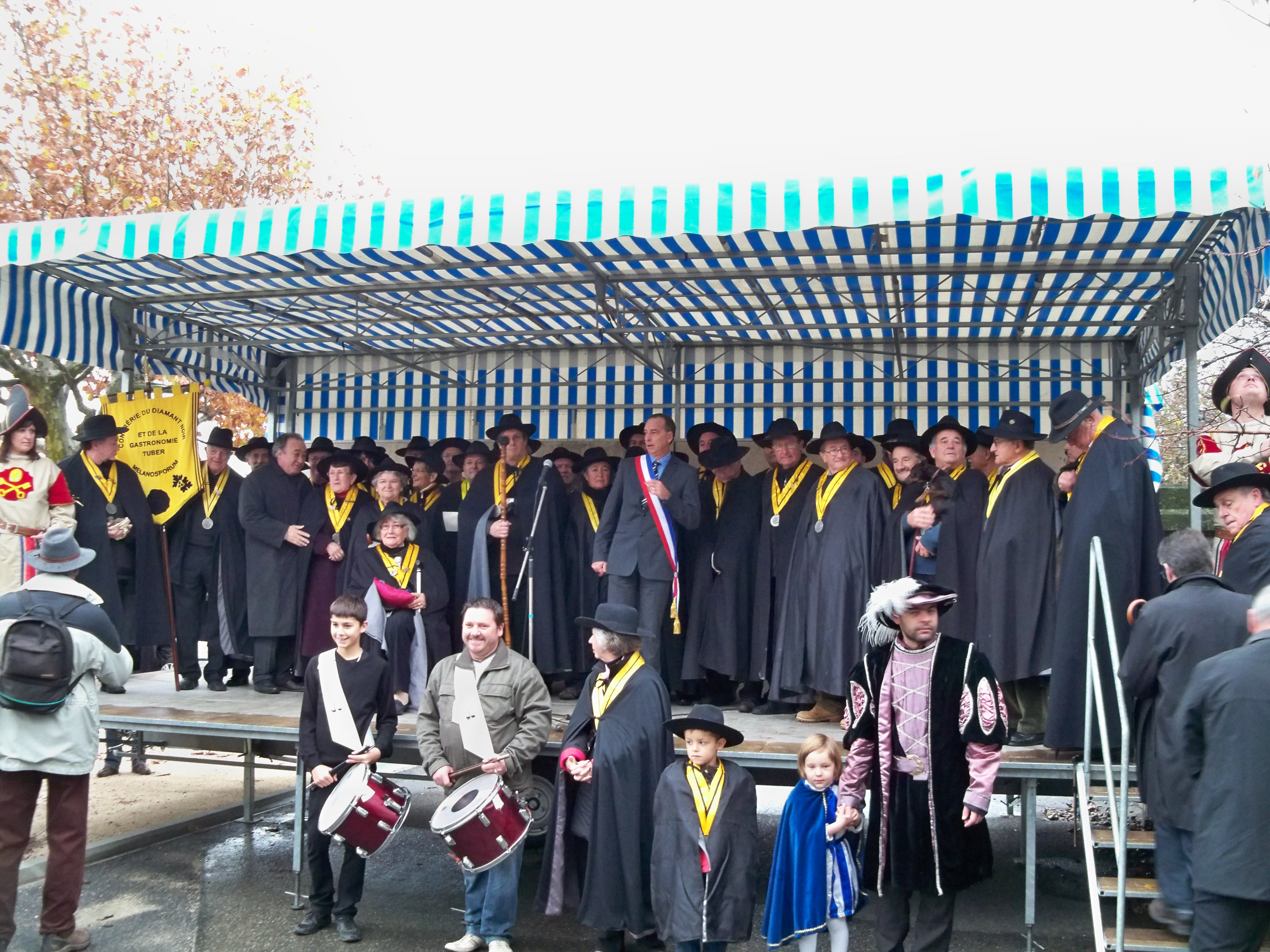 Confrérie du diamant noir de Richerenches (84)